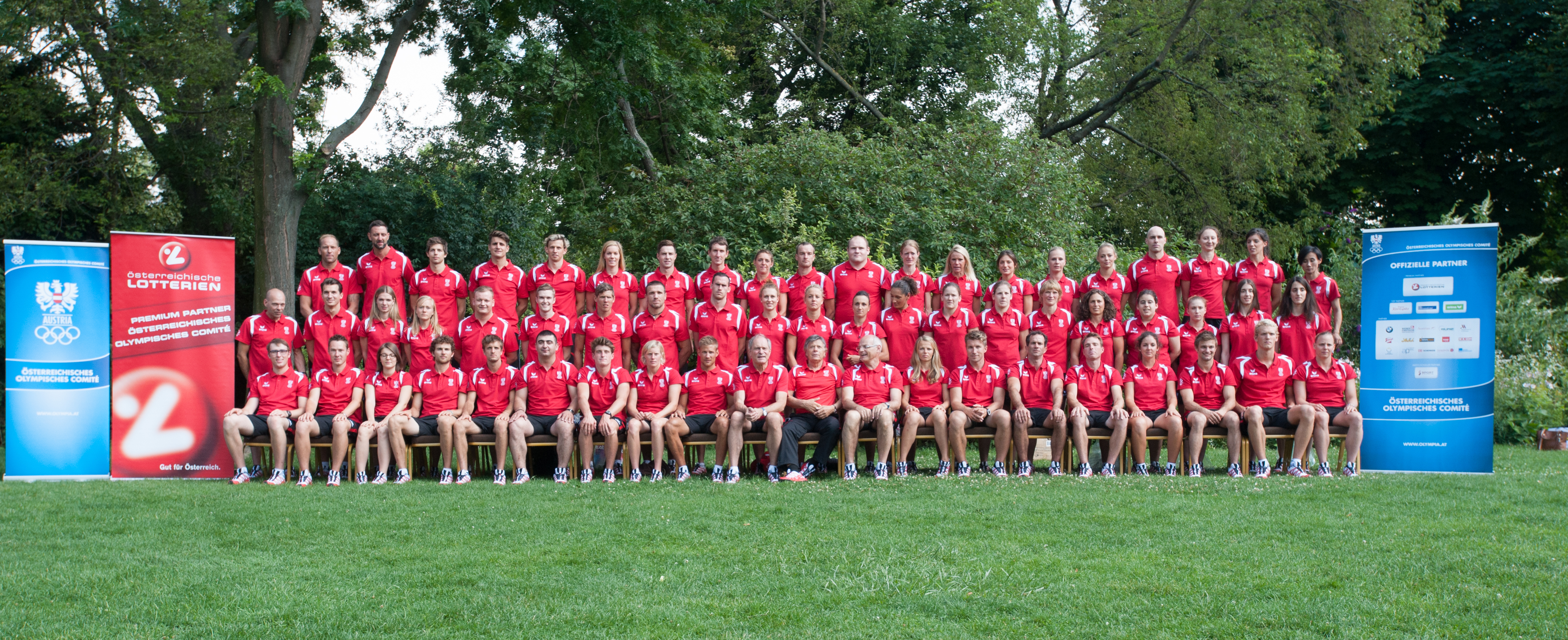 Einkleidung der Österreichischen Teilnehmer an den Olympischen Sommerspielen 2016 am 16./17. Juli 2016 in Wien. Bild zeigt das Österreichische Olympiateam.